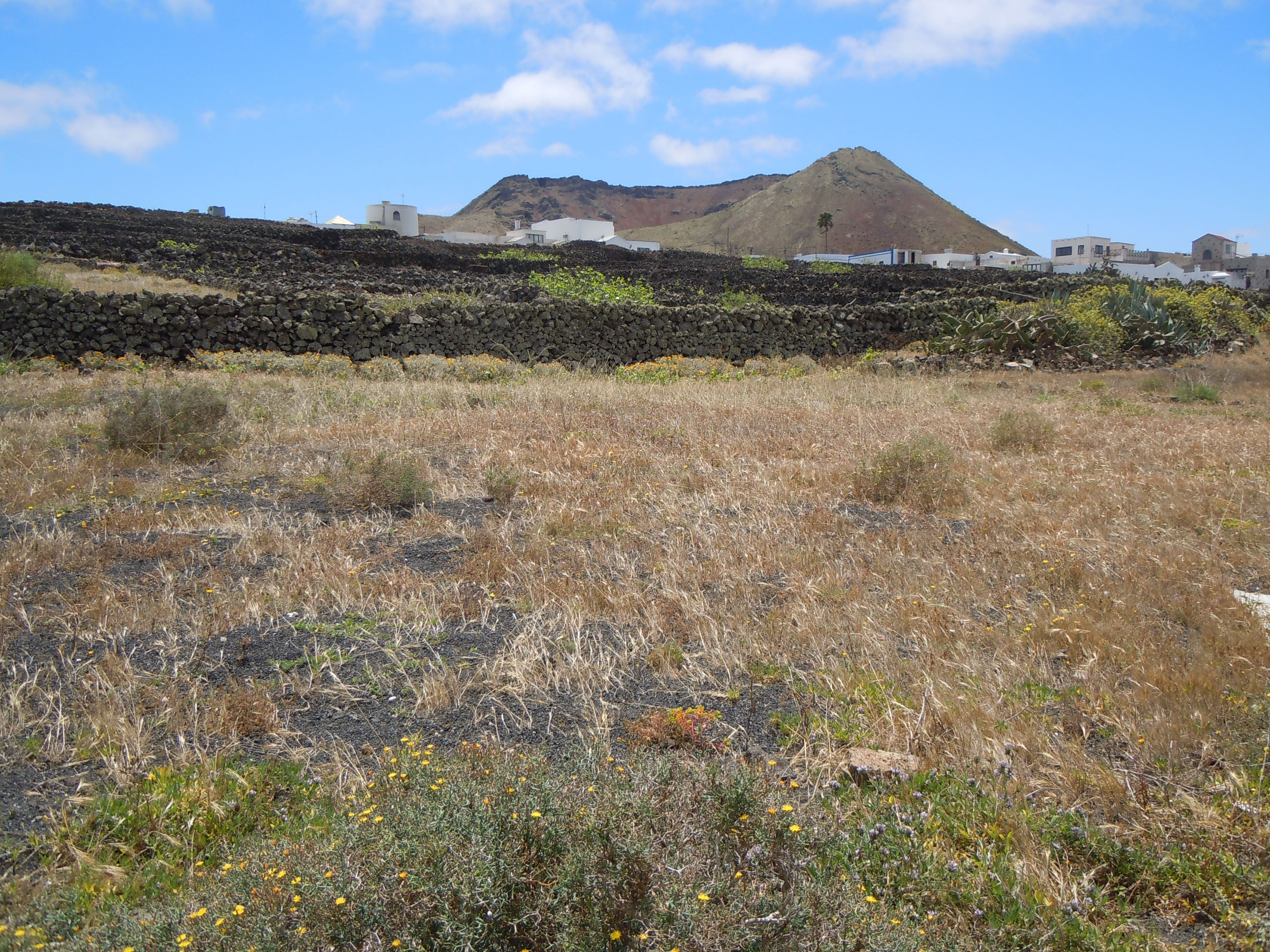 Champs devant le village de category:Ye (Lanzarote) et le Volcan de la Corona, Lanzarote